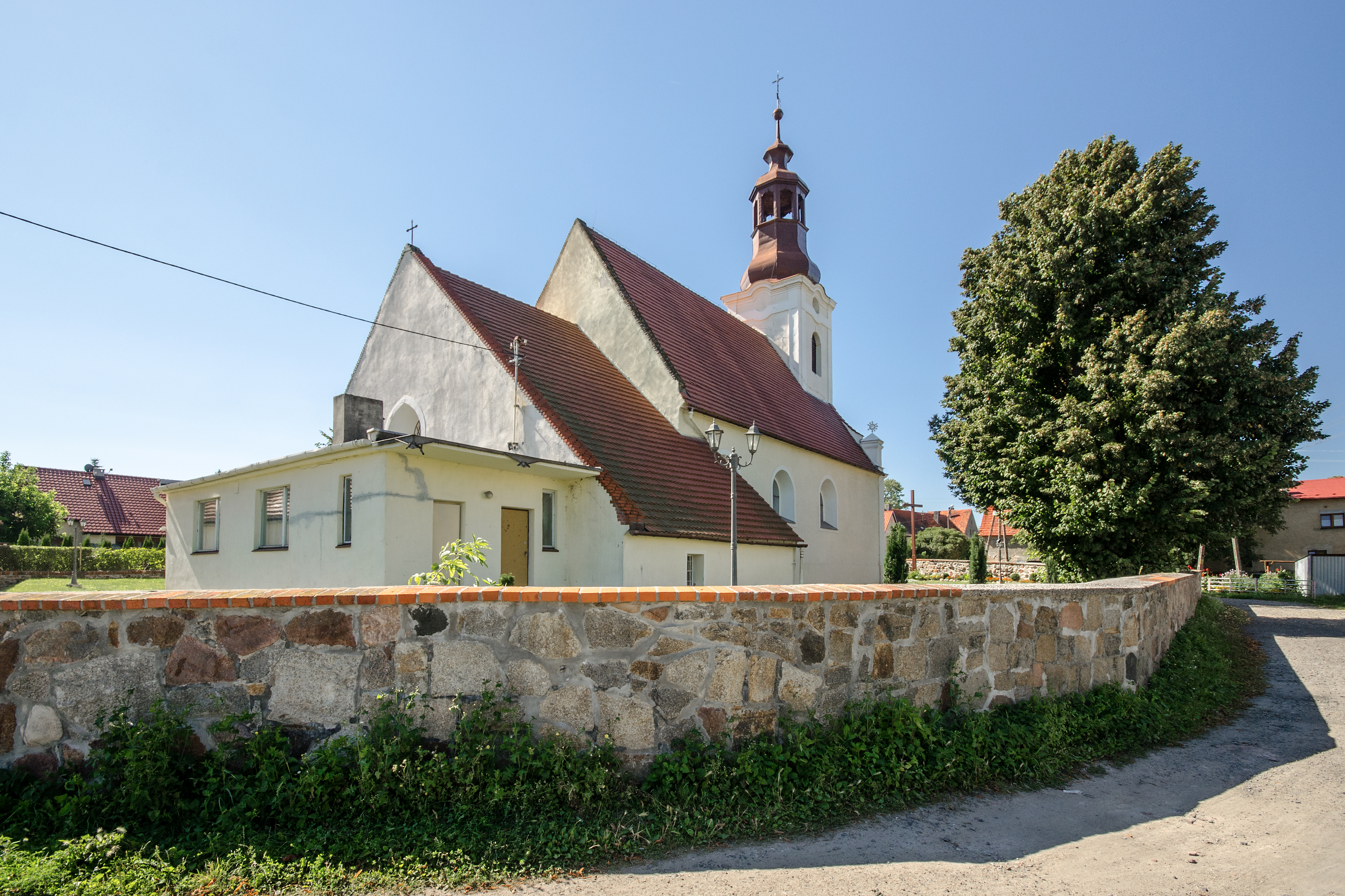 Ciechów, ul. Słoneczna 2 - rzymskokatolicki kościół filialny pw. MB Wspomożenia Wiernych, 1555, 1 poł XVIII